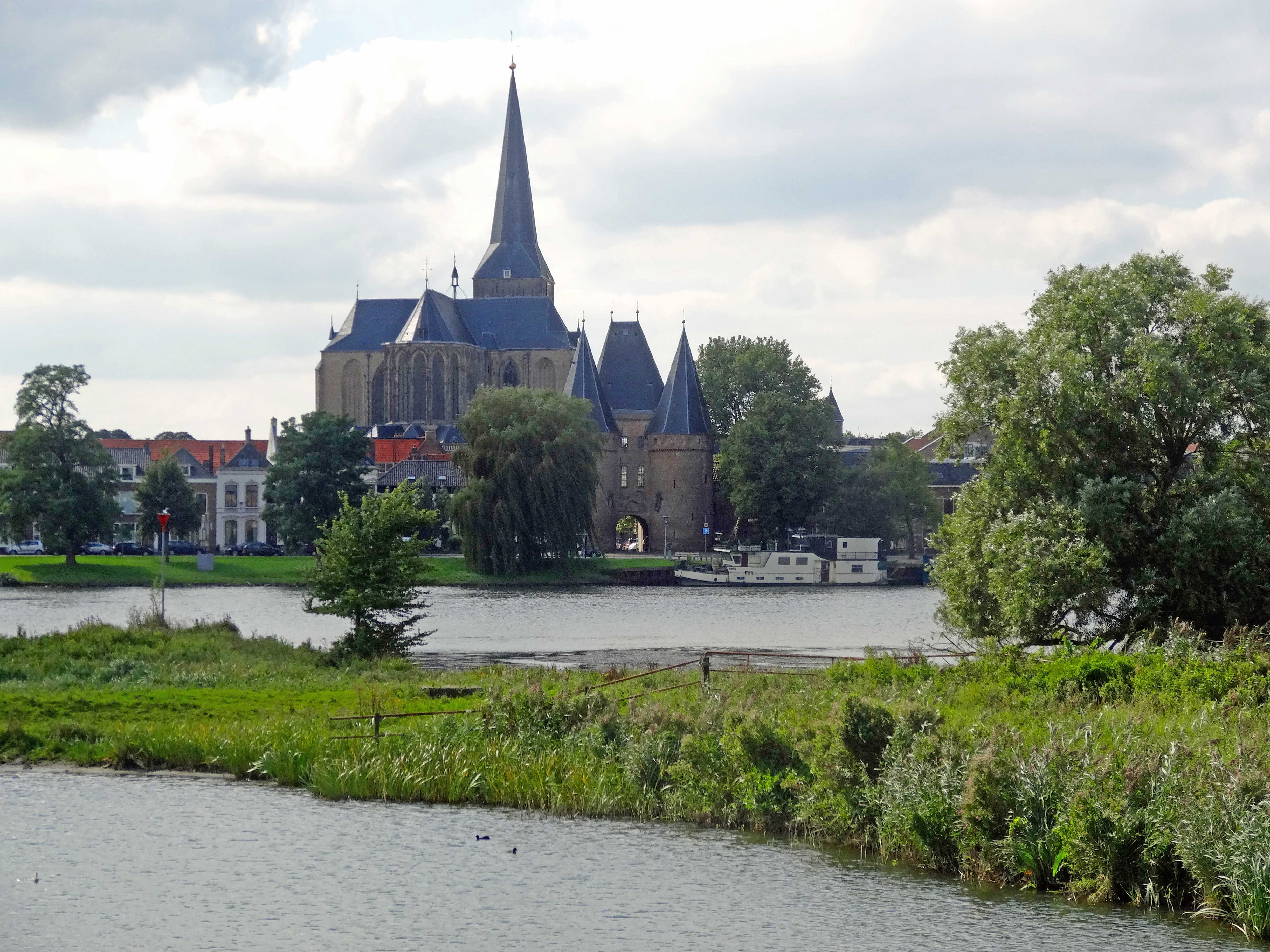 Zicht op Kampen_met Bovenkerk en Koornmarktspoort